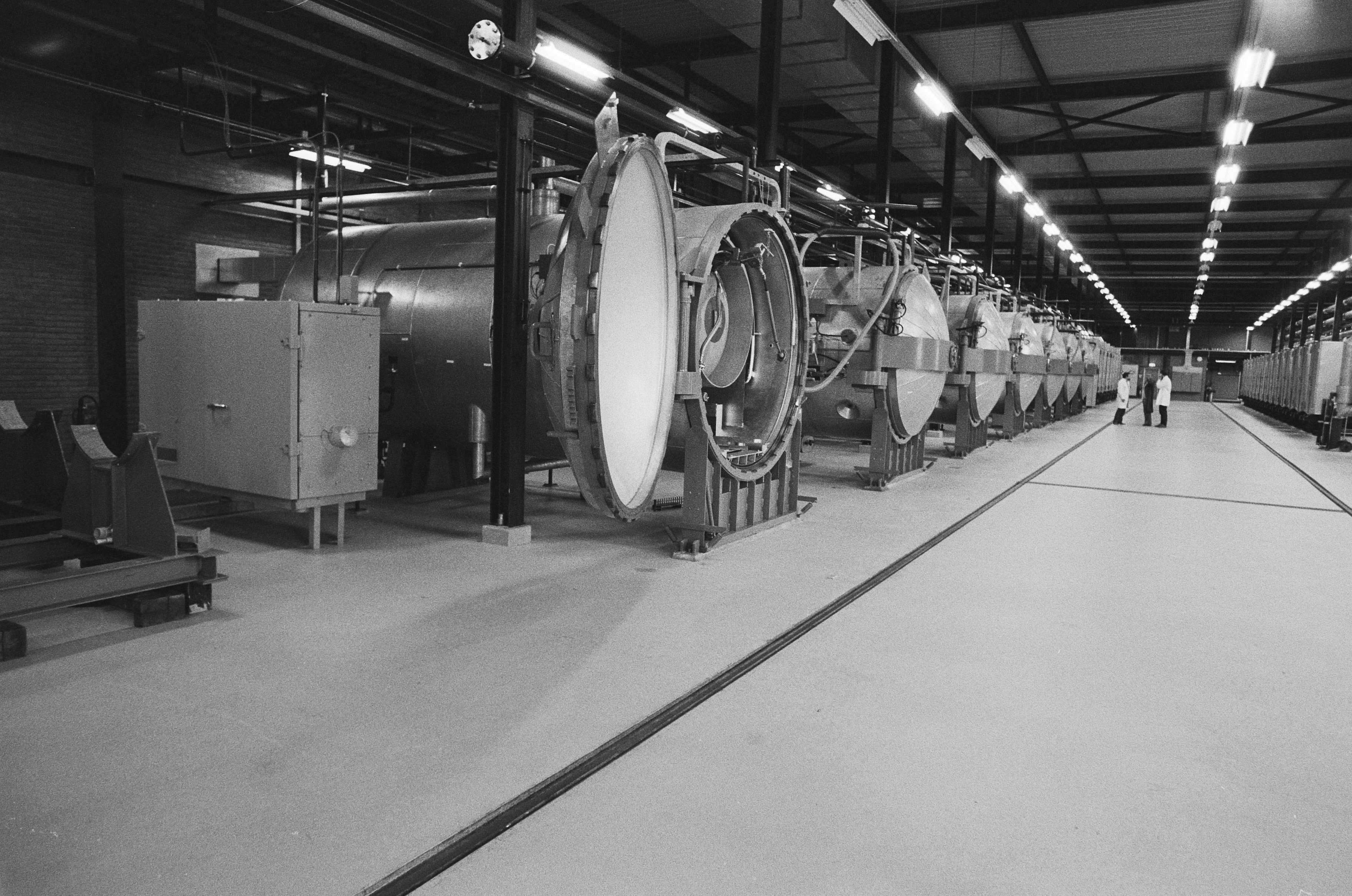 Mr. Pieter van Vollenhoven bezoekt KCN/Urenco; een tank uraniumhexafluoride (F6) in de gasbehandelingsruimte